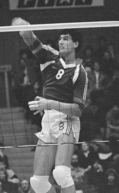 Pre-Olympische volleybaltoernooi; Nederland tegen Belgie; Ron Zwerver